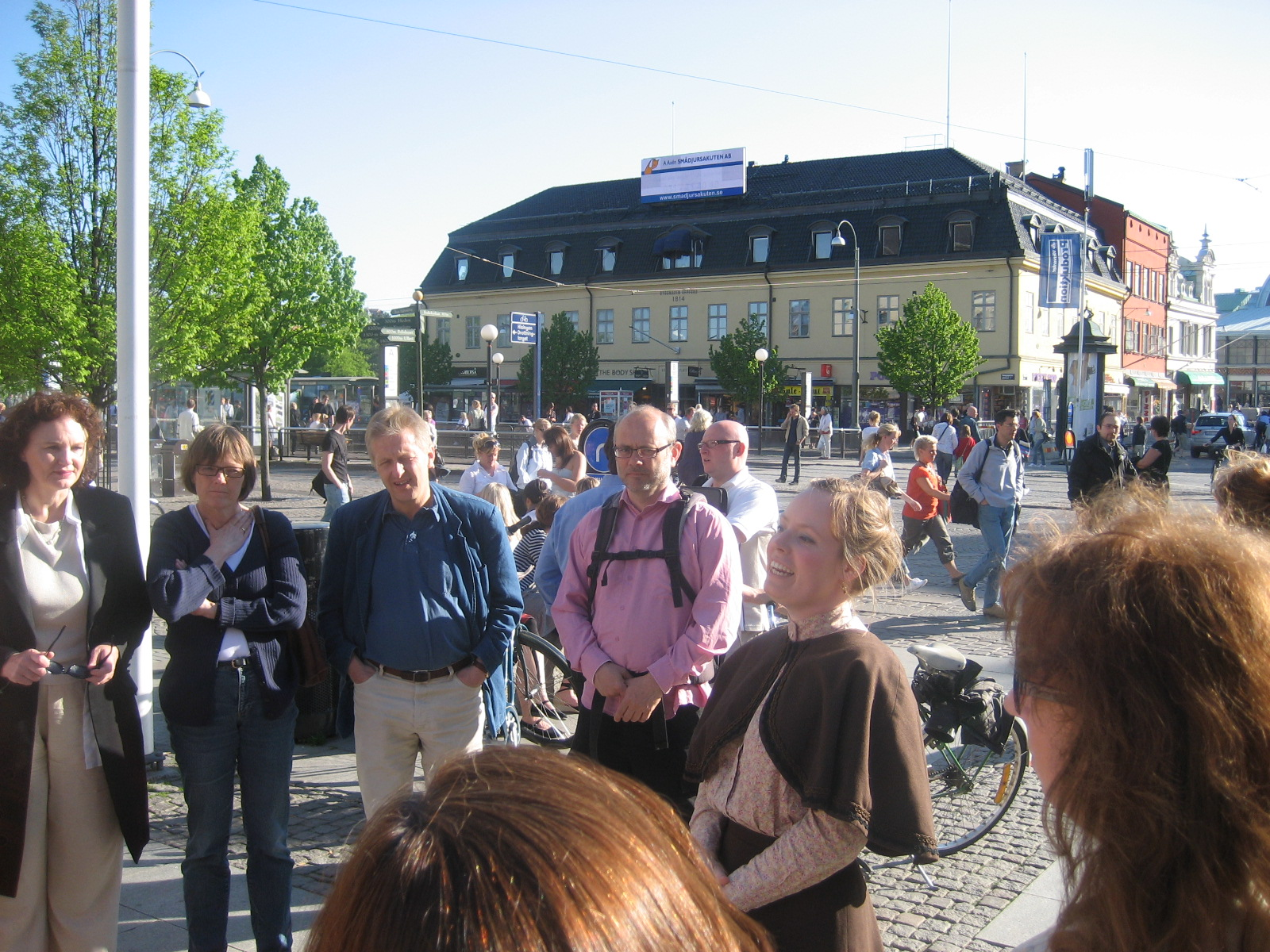 Dramatiserad stadsvandring (Kungsportsplatsen, Göteborg)